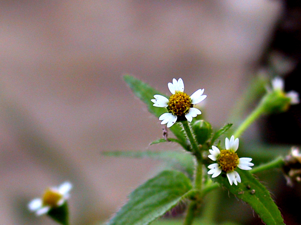 Galinsoga quadriradiata